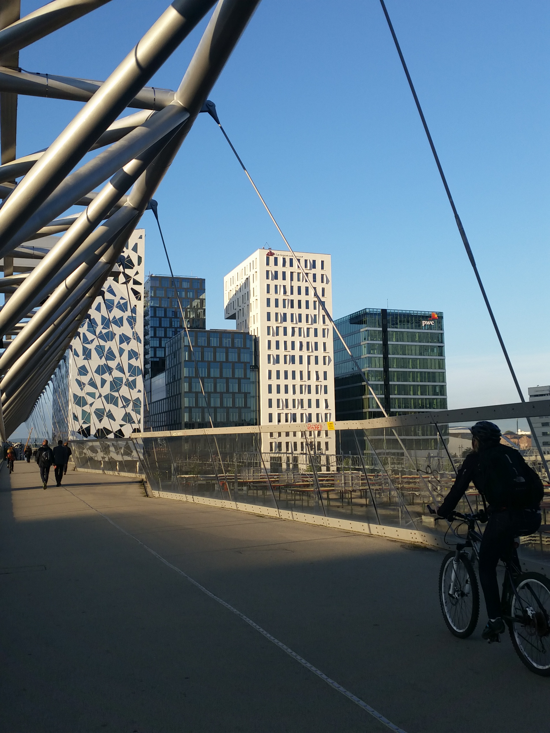 Barcode sett fra Akrobaten bro.